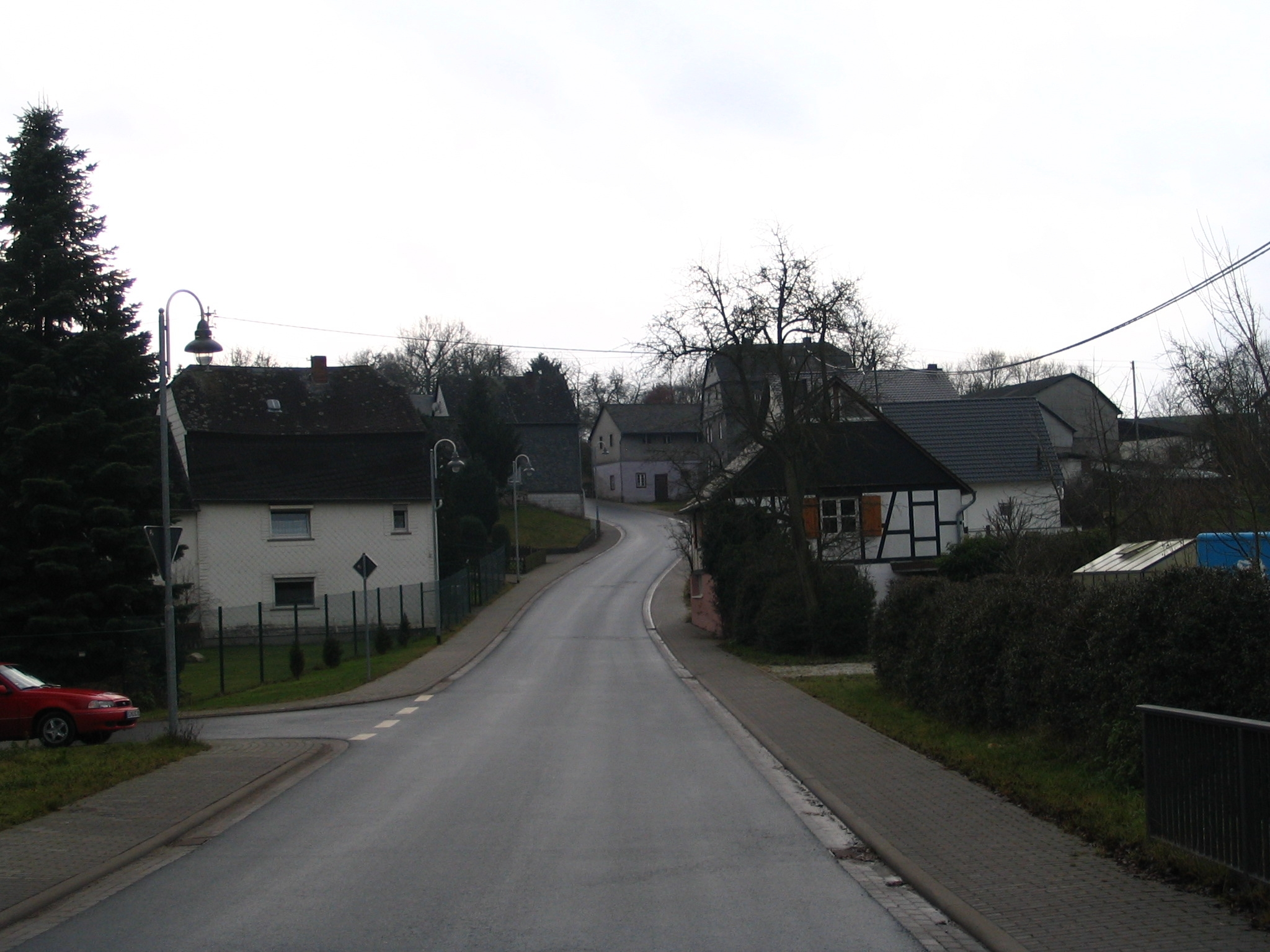 Dorfstrasse Rohrbach, Hunsrück